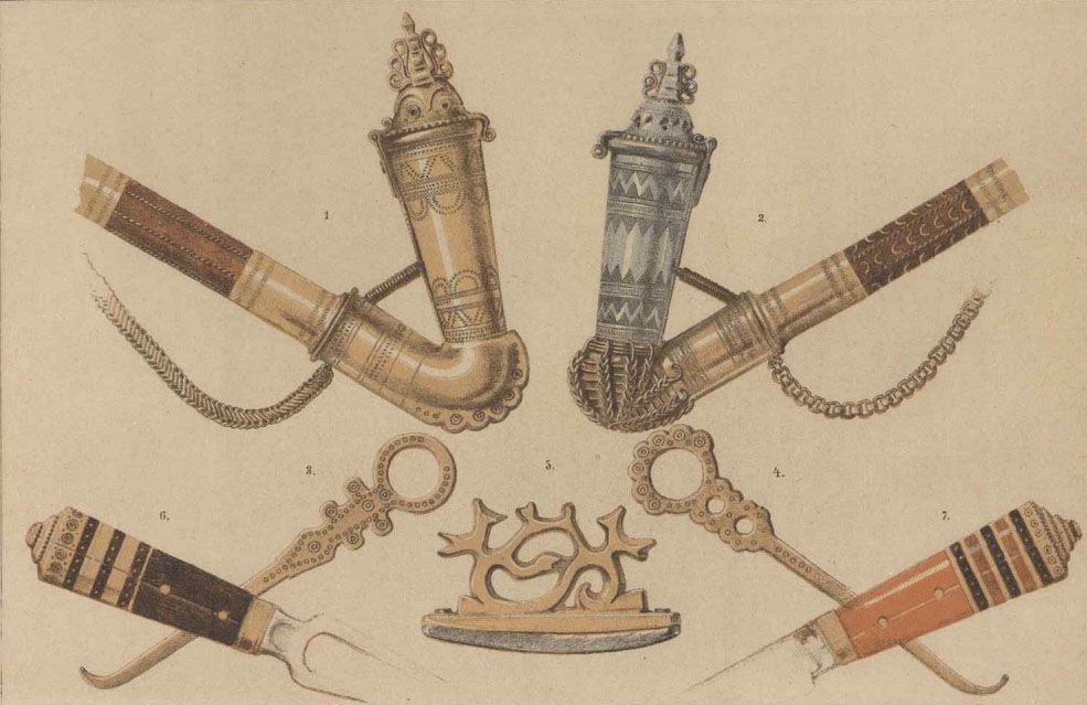 Сторінка з видання "Взори промислу домашнього. Металеві вироби селян на Русі" Табл.VII 1, 2 - люльки з цибушком на рекизях 3, 4 - протички 5 - кресивце 6, 7 - виделка і ніж